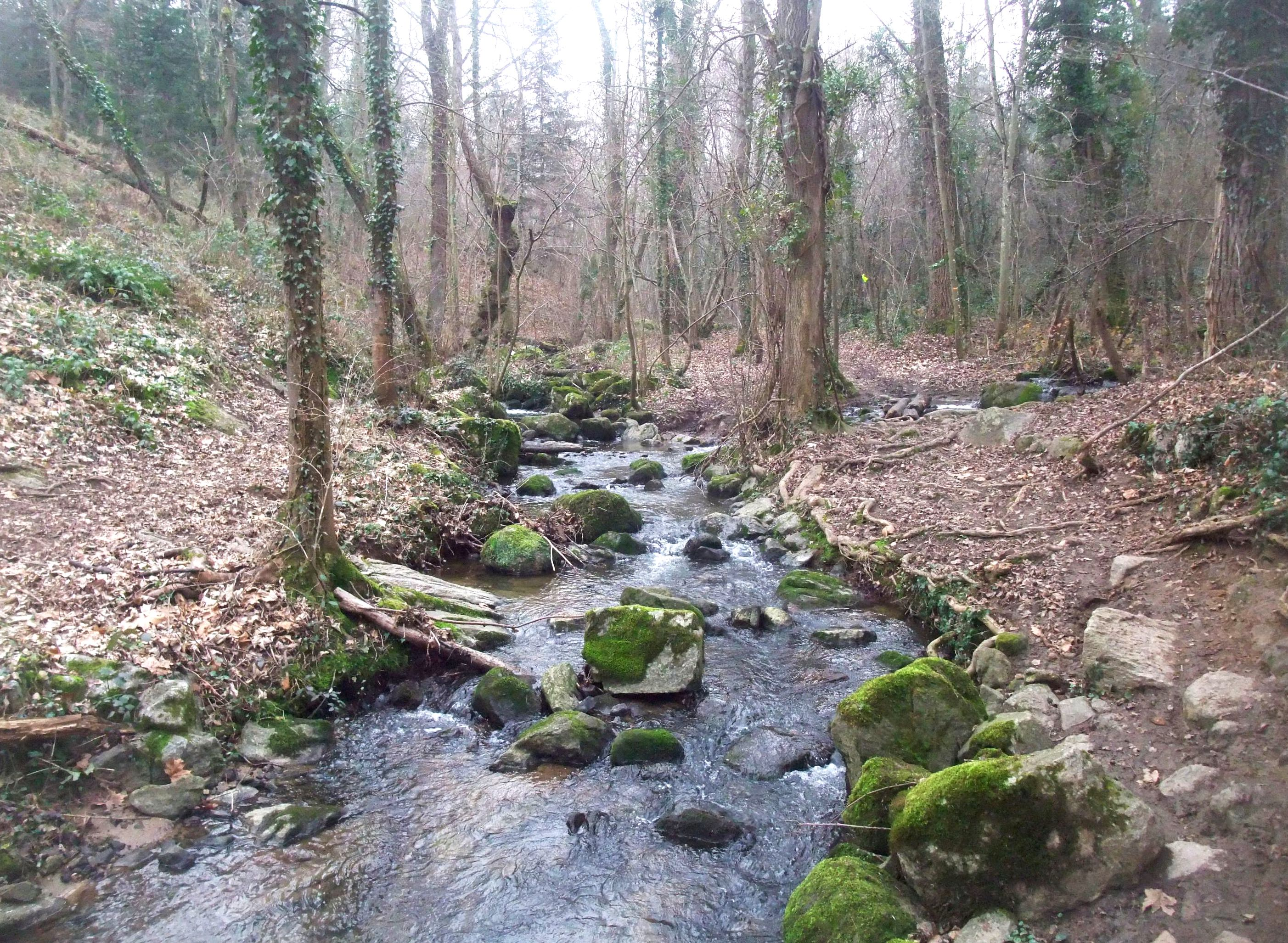 St-Cyr Ecoutay 1